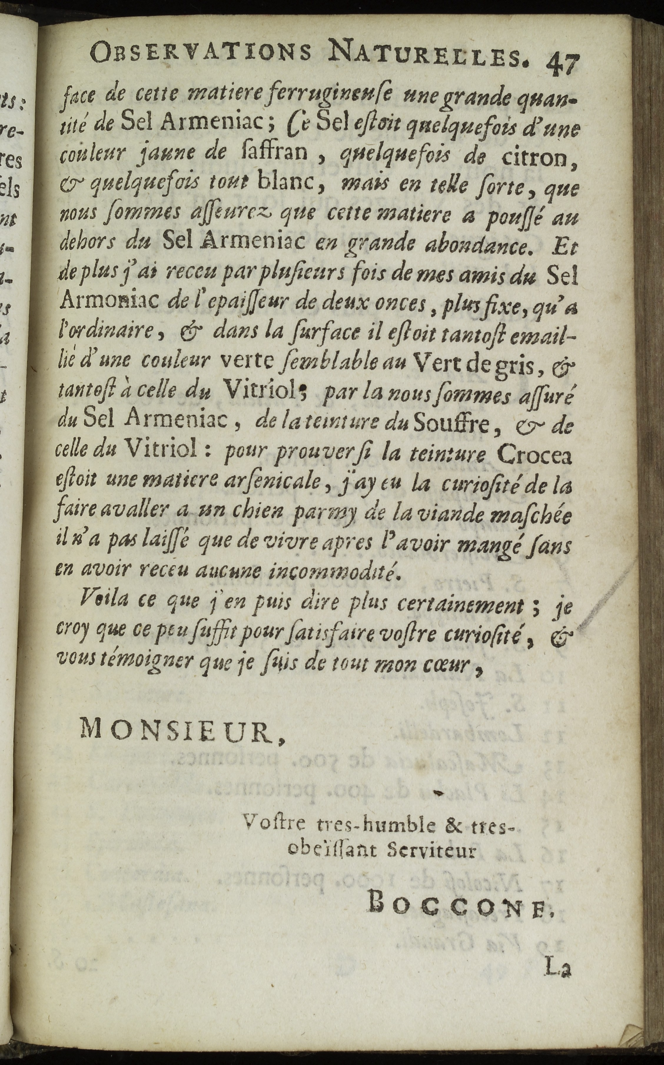 Photo showing text from Septieme Lettre a Monsieur L'abbe Bourdelot, Seignor de Conde et S. Leger, a Chantilly. Touchant l'embrazement du Mont-Etna (Letter concerning an eruption of Mount Etna). Title of book: Recherches et observations naturelles de Monsieur Boccone ... touchant le corail, la pierre etoilée, les pierres de figure de coquilles, la corne d'ammon, l'astroïte undulatus, les dents de poissons pétrifiées, les herissons alterez, l'embrasement du mont Etna, la sangsüe du Xiphias, l'alcyonium stupposum, le bezoar mineral & les plantes qu'on trouve dans la Sicile, avec quelques reflexions sur la vegetation des plantes : examinées à diverses fois dans l'Assemblée de messieurs de Société Royale de Londres, et conferences dans les de Monsieur l'Abbe Bourdelot à Paris / [Paolo Boccone]. Published 1674. Wellcome Images Keywords: Italy; Natural History; Book; Etna; Volcano; Books